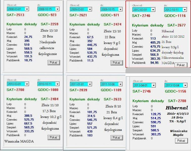 Parametry dojrzewania winogron Hibernal